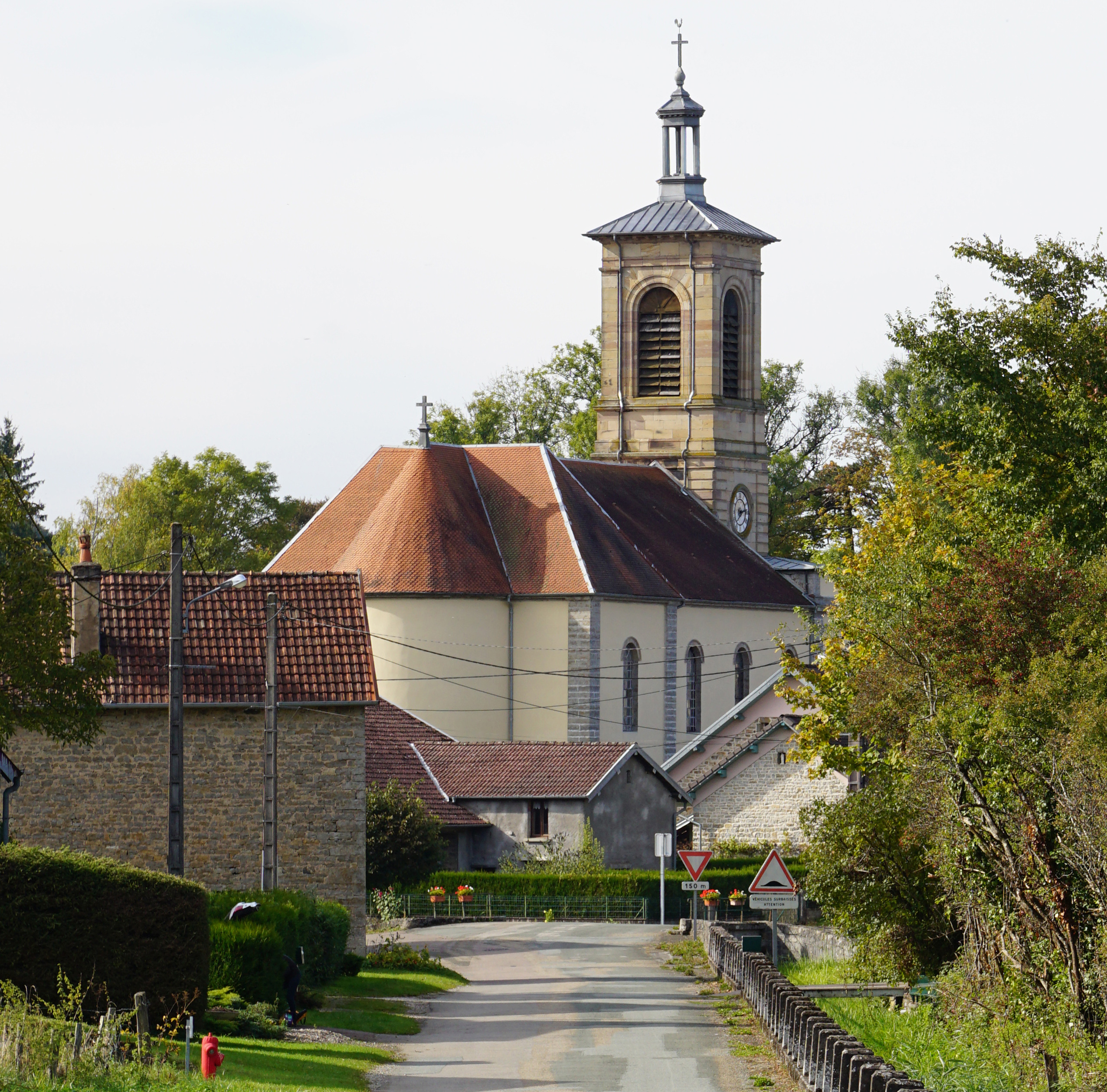 L'église de Cubrial.